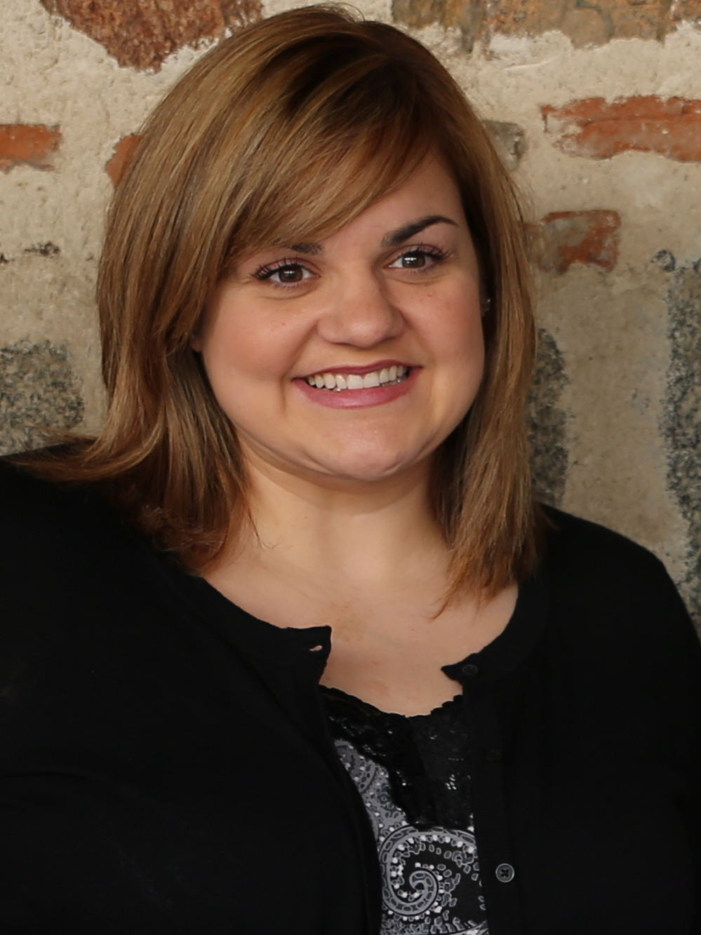 Los voluntarios de DAV Ávila con Abby Johnson en la comida de bienvenida.